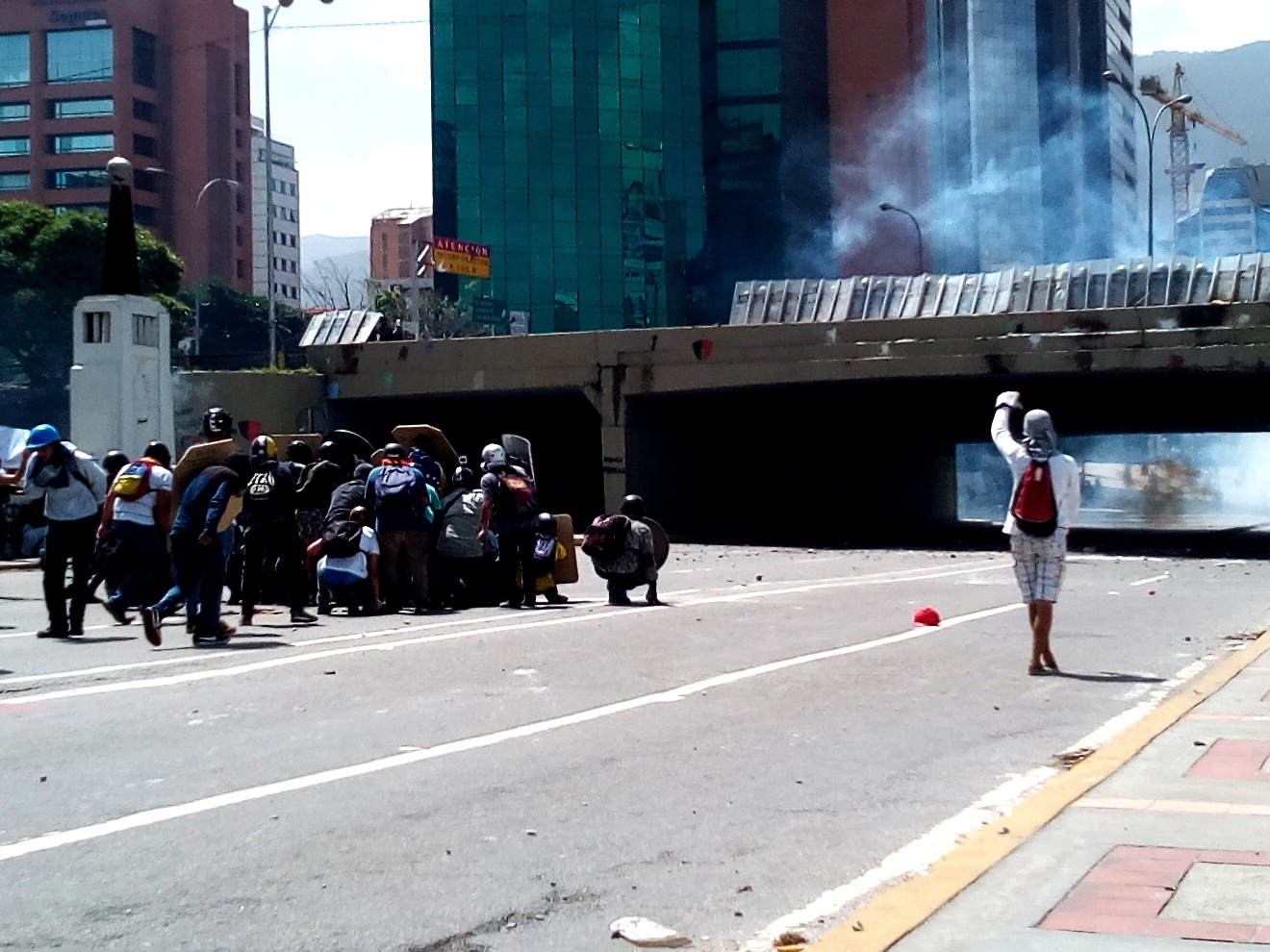 Protestantes se enfrentan a la GNB en el puente de Las Mercedes el 26 de mayo de 2017 en Caracas, Venezuela.